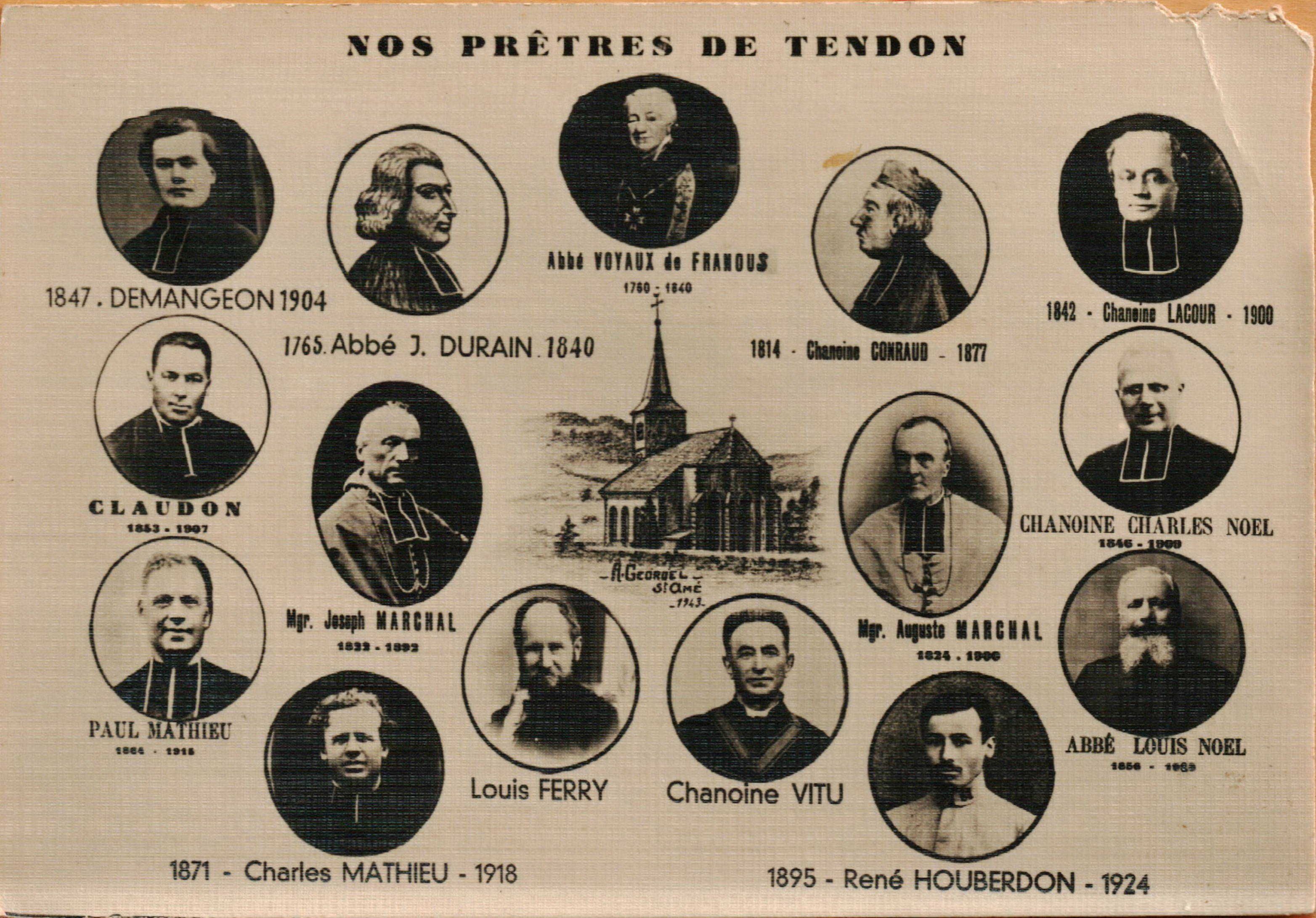 Carte postale des différents prêtres de la commune de Tendon